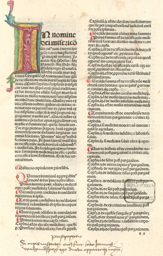 Mesue, Venice 1479, page 1